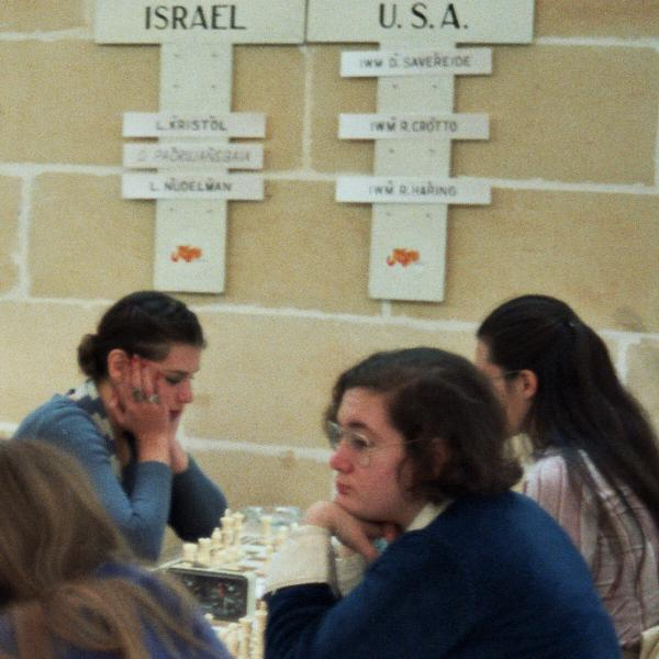 Rachel Crotto, Schacholympiade 1980 in Valetta auf Malta Fotografiert von Gerhard Hund im November 1980 in Valetta.